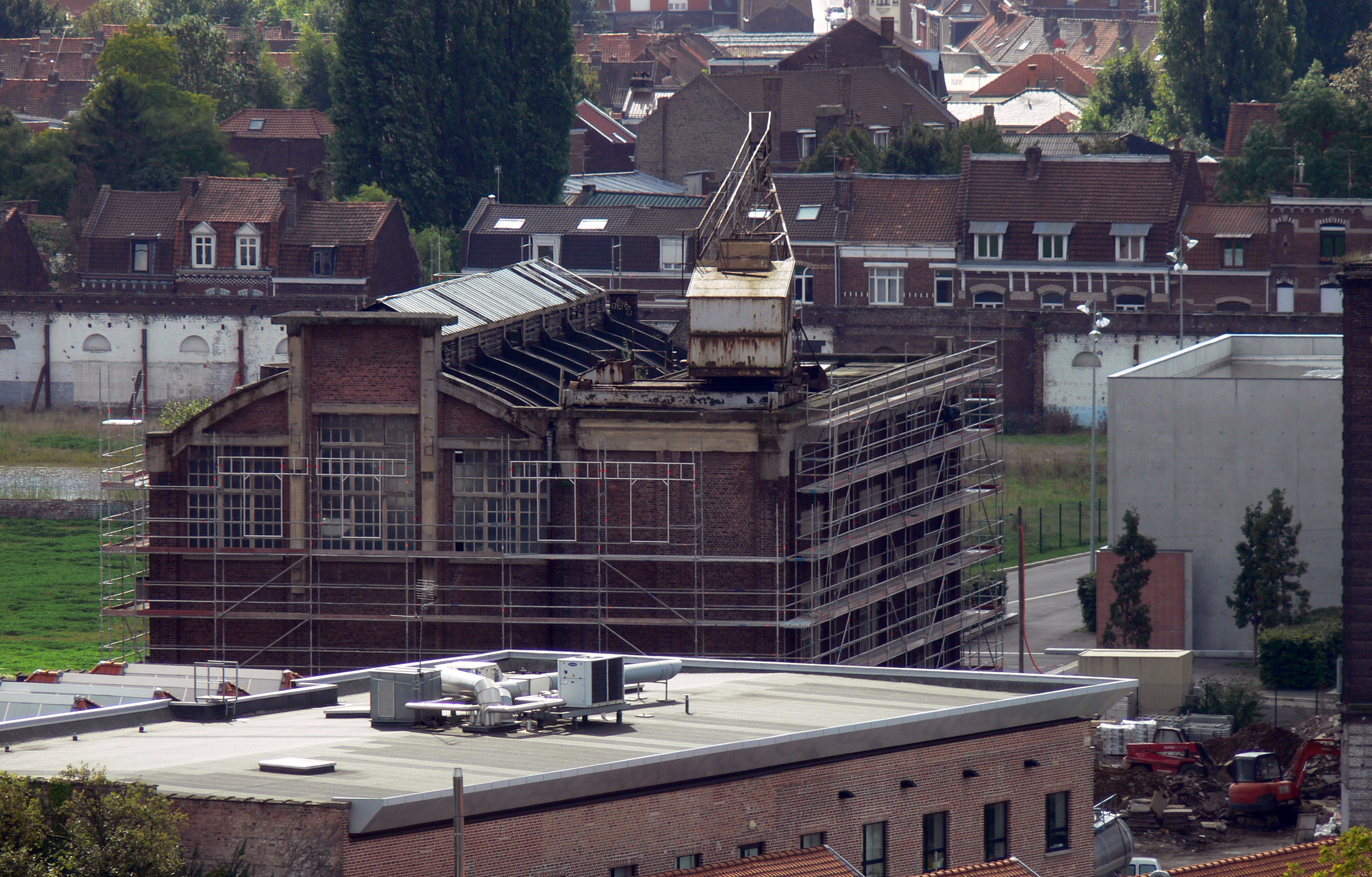 Zone de l'Union, "La plaine Image" , ancienne chaufferie industrielle de l'usine Vanoutryve, en cours de réhabilitation, après désamiantage. La grue fixée sur le toit sera conservée (date de la photo : 2010-09-17)